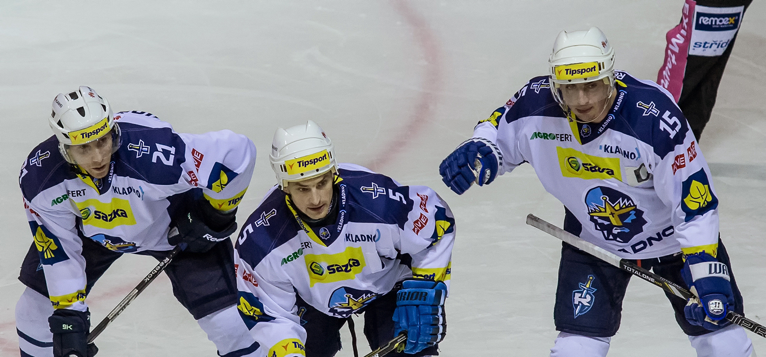 #21 Miloslav Hořava, #5 Libor Procházka and #15 Tomáš Kaberle Rytíři Kladno 0:2 HC Energie Karlovy Vary; Tipsport Extraliga, 2014-02-28